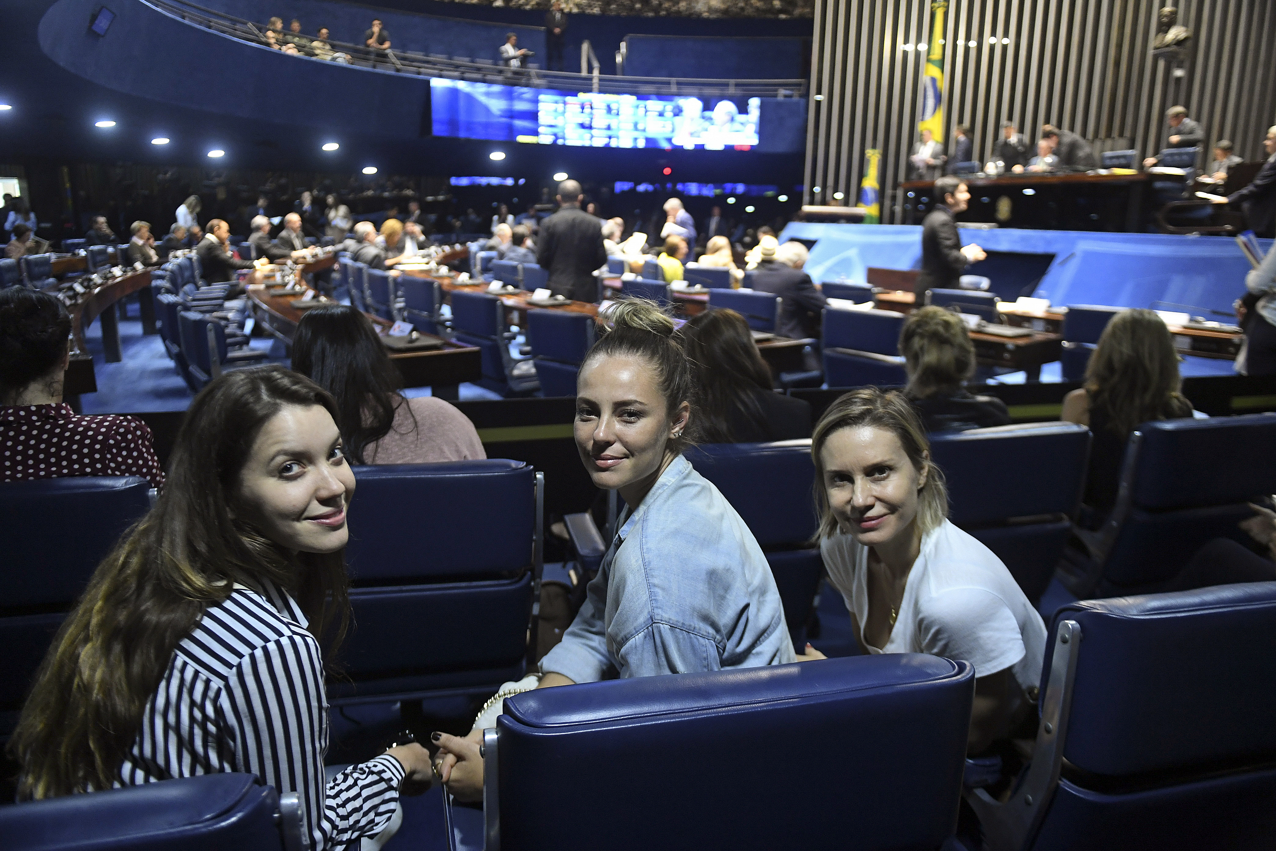 Plenário do Senado Federal durante sessão deliberativa ordinária. Ordem do dia. As atrizes Nathalia Dill, Paola Oliveira e Paula Burlamaqui acompanham sessão na tribuna de honra. As artistas vieram ao encontro do presidente do Senado para tratar sobre a votação do PLS 470/18 que aumenta a proteção aos animais.